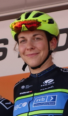 Alison Jackson (Tibco-SVB) bij de start van de eerste etappe van Stramproy naar Weert in de Boels Ladies Tour 2019